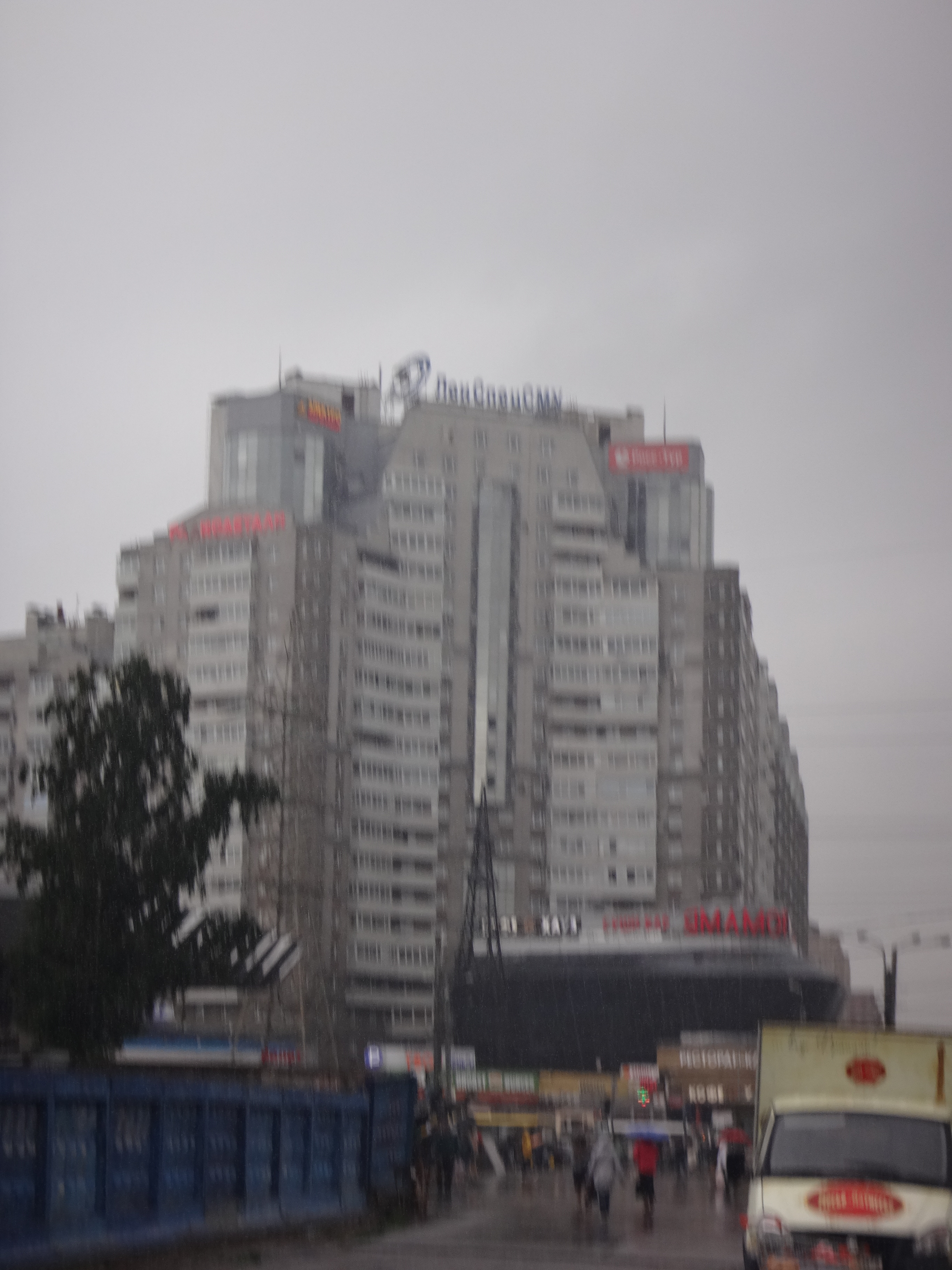 Высотный дом на углу Испытателей и Коломяжского. Смазанность получиалсь из-за дождя